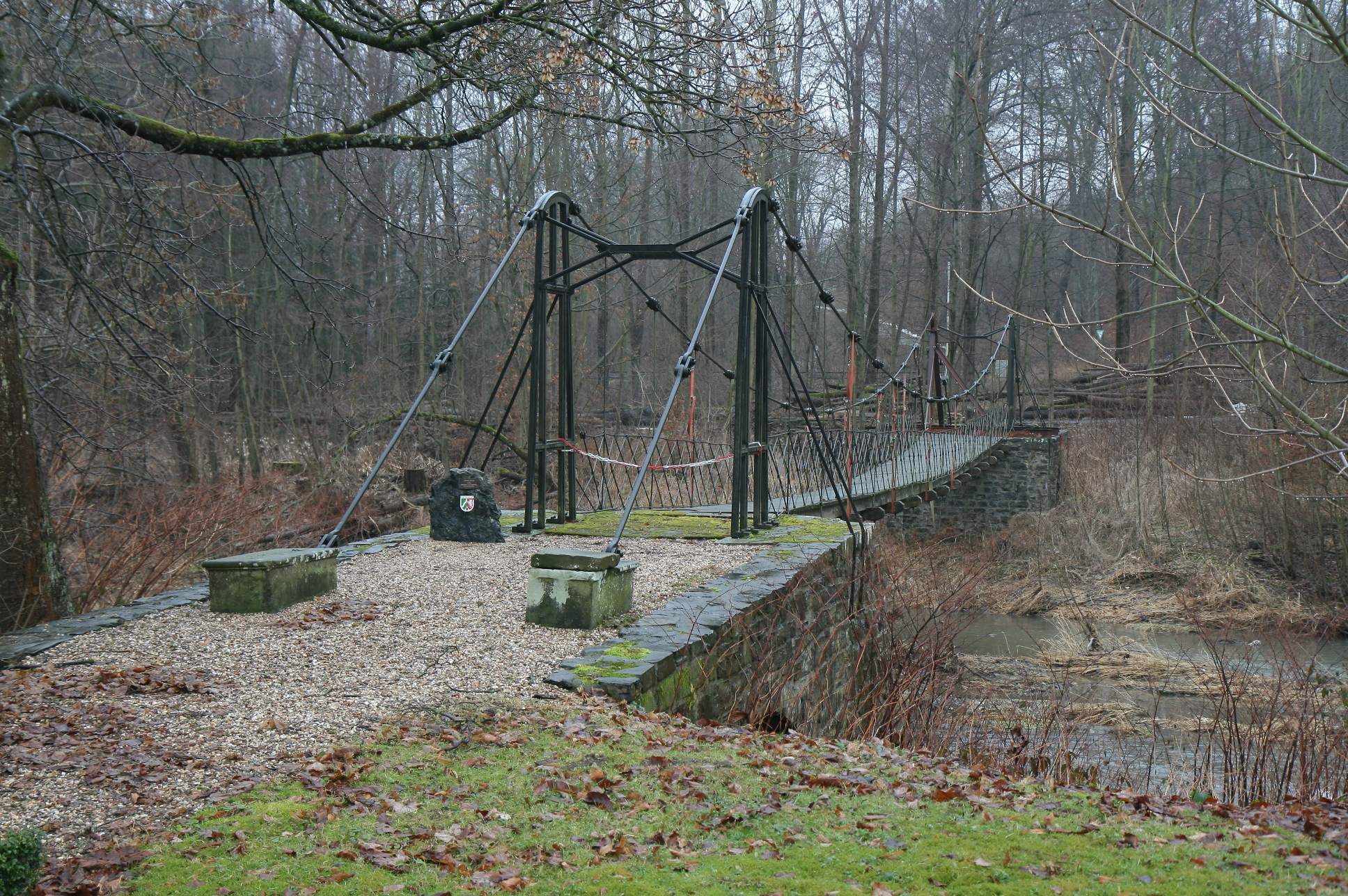 Unter Denkmalschutz (technisches Denkmal) stehende Kettenhängebrücke für Fußgänger aus dem Jahr 1839 im Schlosspark Laer in Meschede.